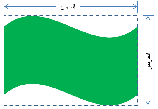 رسم توضوحي للاستطالة